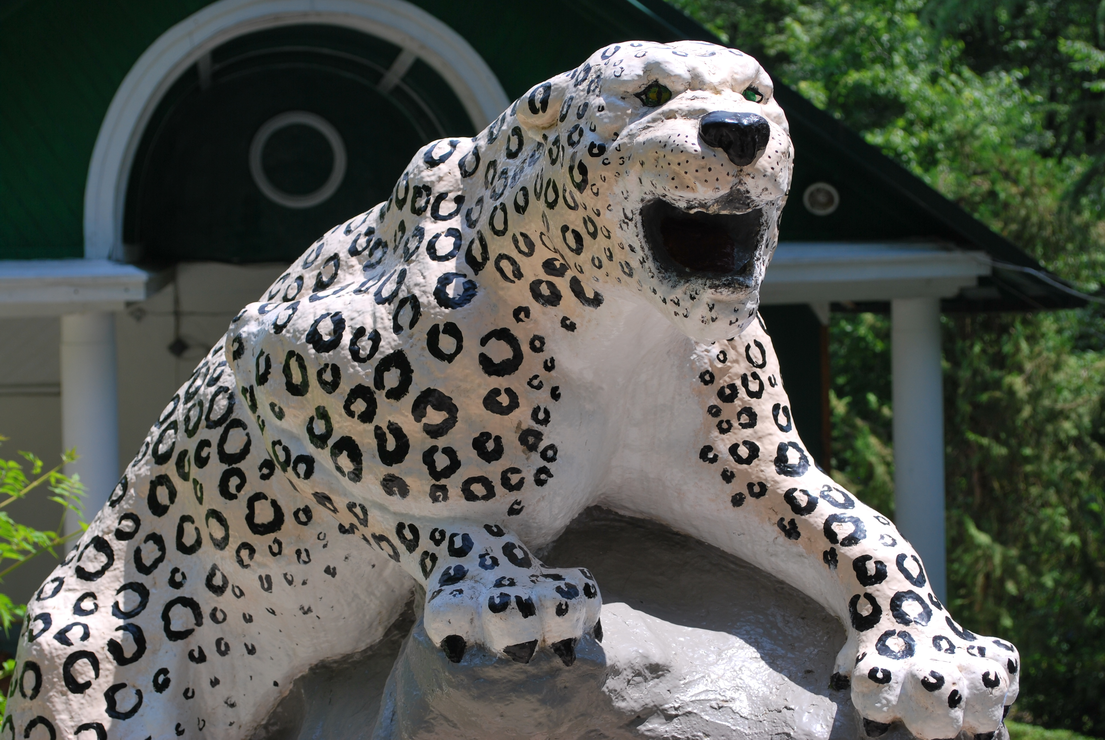 Скульптура у входа в Тисо-Самшитовую рощу (Хоста, Сочи)